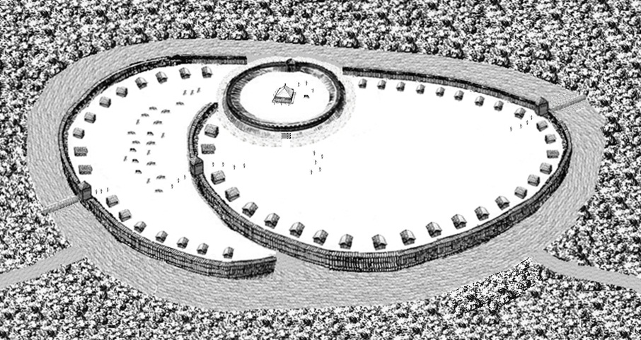 Burgwall Ravensburg in Neubrandenburg, Rekonstruktionsversuch